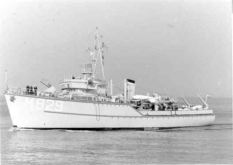 Hr.Ms. Elst varend in het kanaal